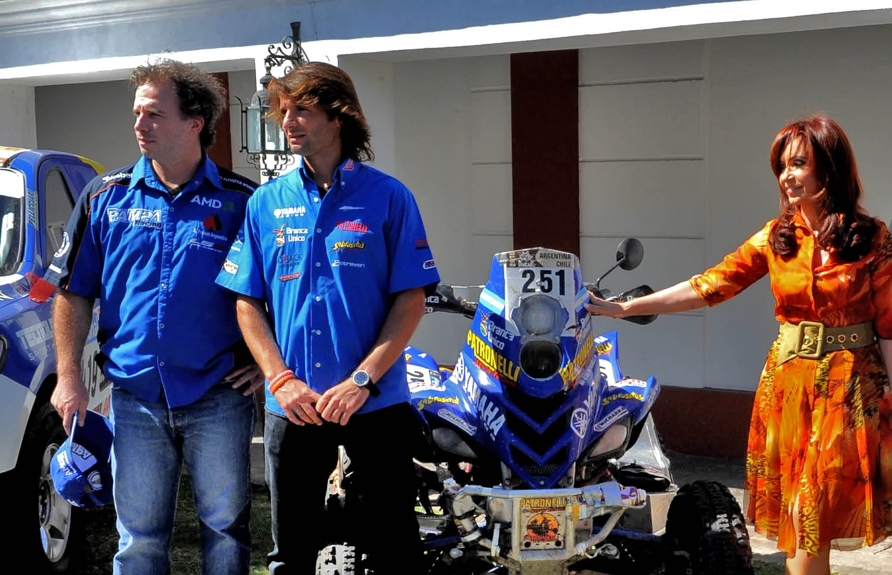 Cristina Fernández, presidenta argentina, junto a los hermanos Patronelli